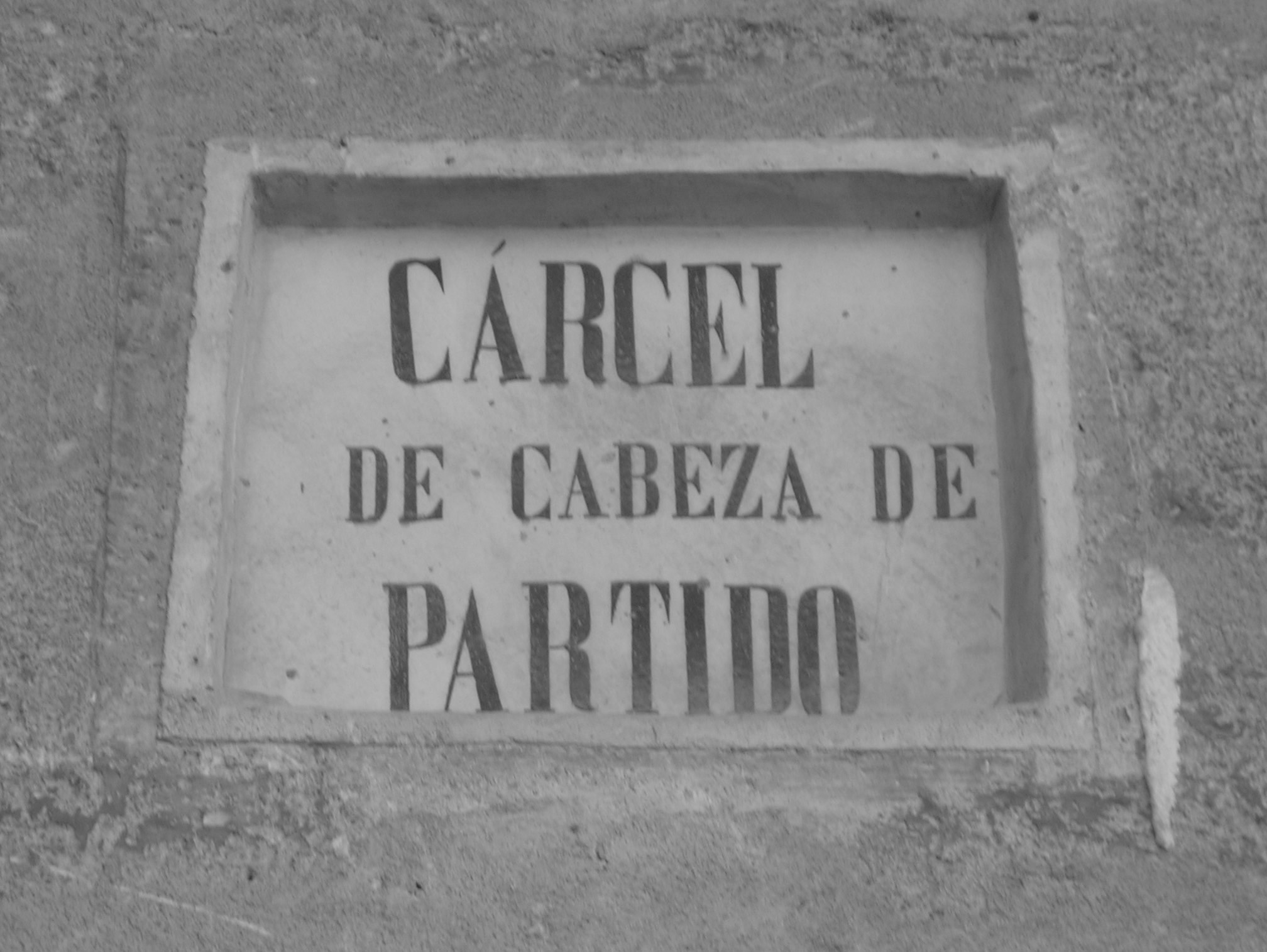 Rótulo indicador de la "cárcel de cabeza de partido" que se encontraba en la actual sede de la policía local en la plaza del Arco de Caravaca de la Cruz, Murcia, España. Foto de febrero de 2006.